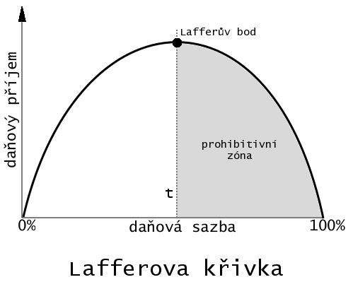 Vytvořeno pomocí GIMPu.